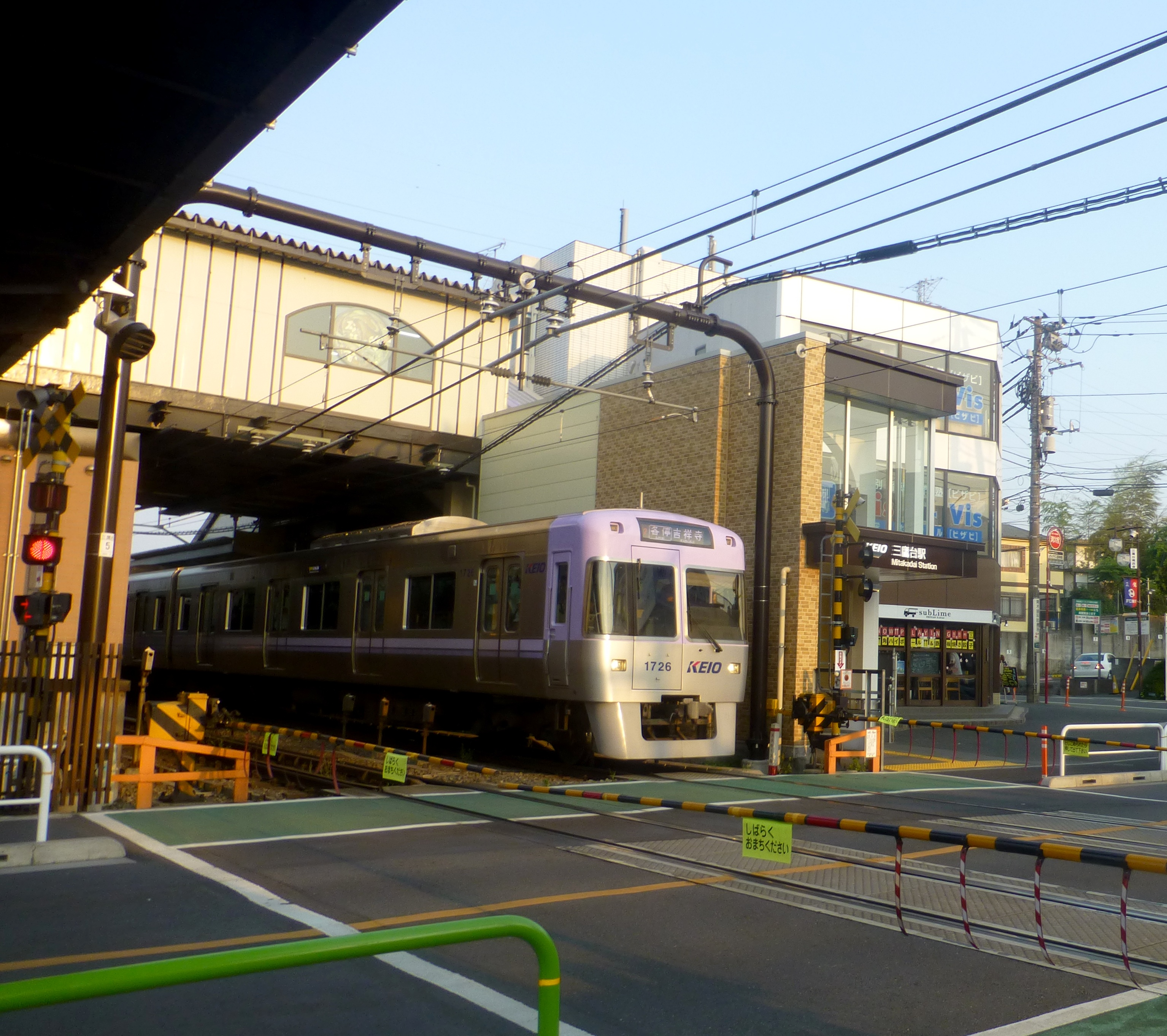 Mitakadai Station (三鷹台駅)